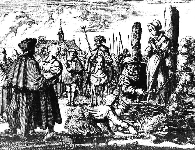 Сжигание Ведьмы Приготовления к казни в 1544 году.